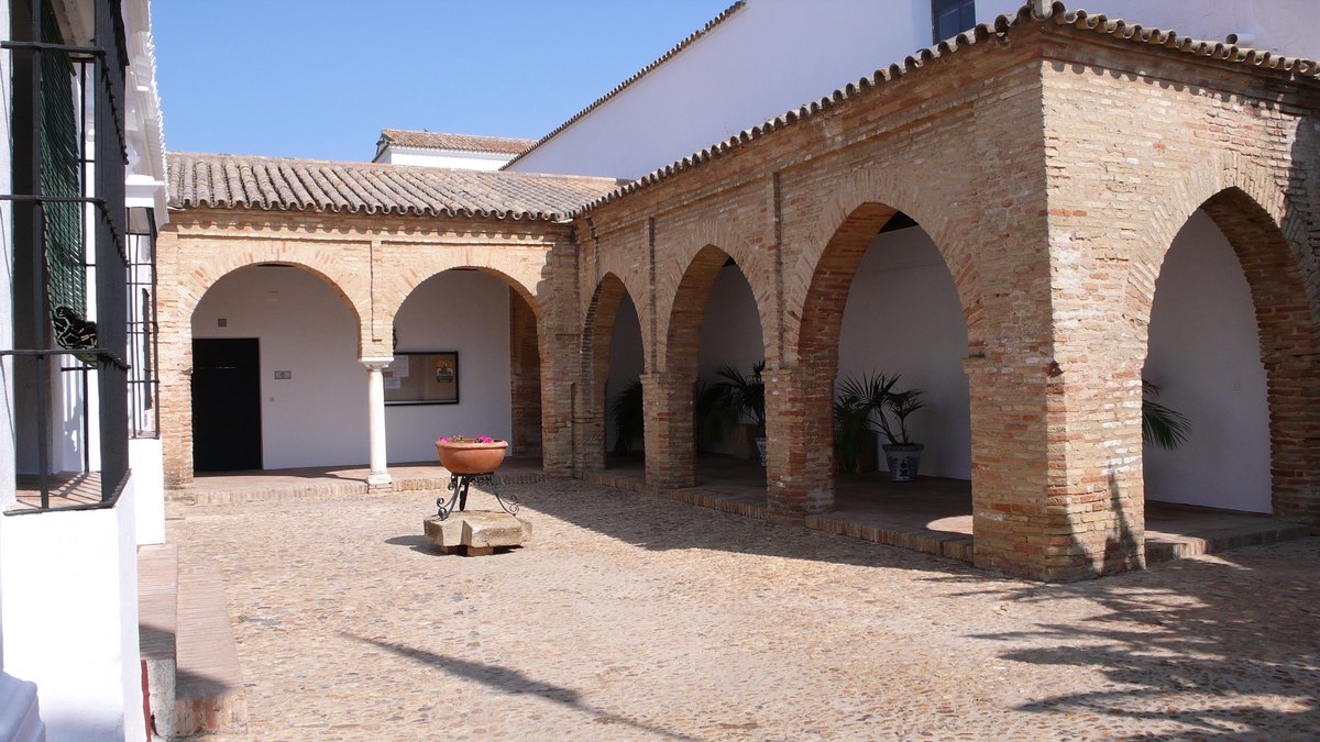 Compás del Monasterio de Santa Clara (Moguer)